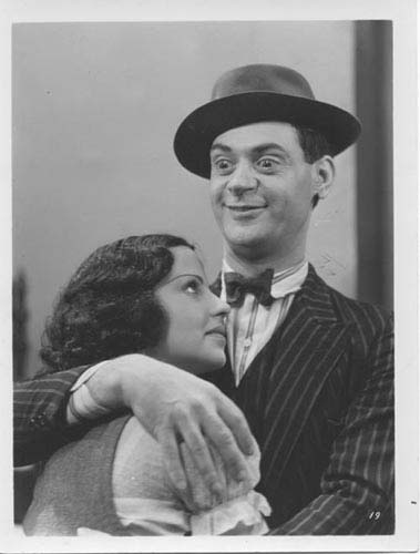 Escena en un interior de la película "Loco lindo", en plano corto, con el actor Luis Sandrini de medio cuerpo abrazando a la actriz Anita Jordán.